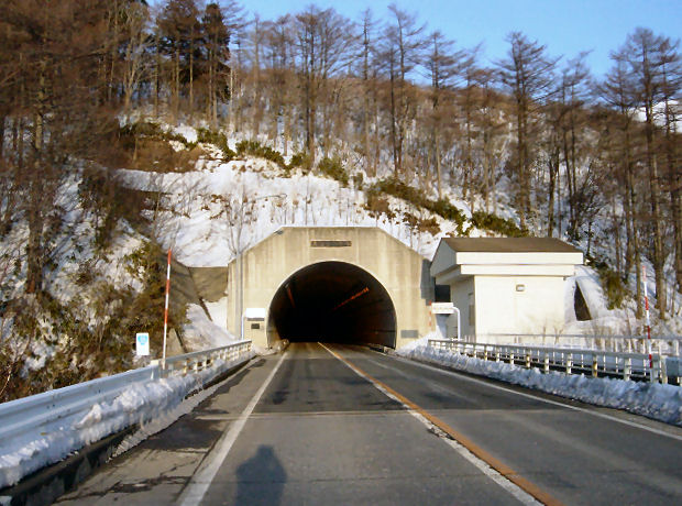 土湯トンネル猪苗代側坑口